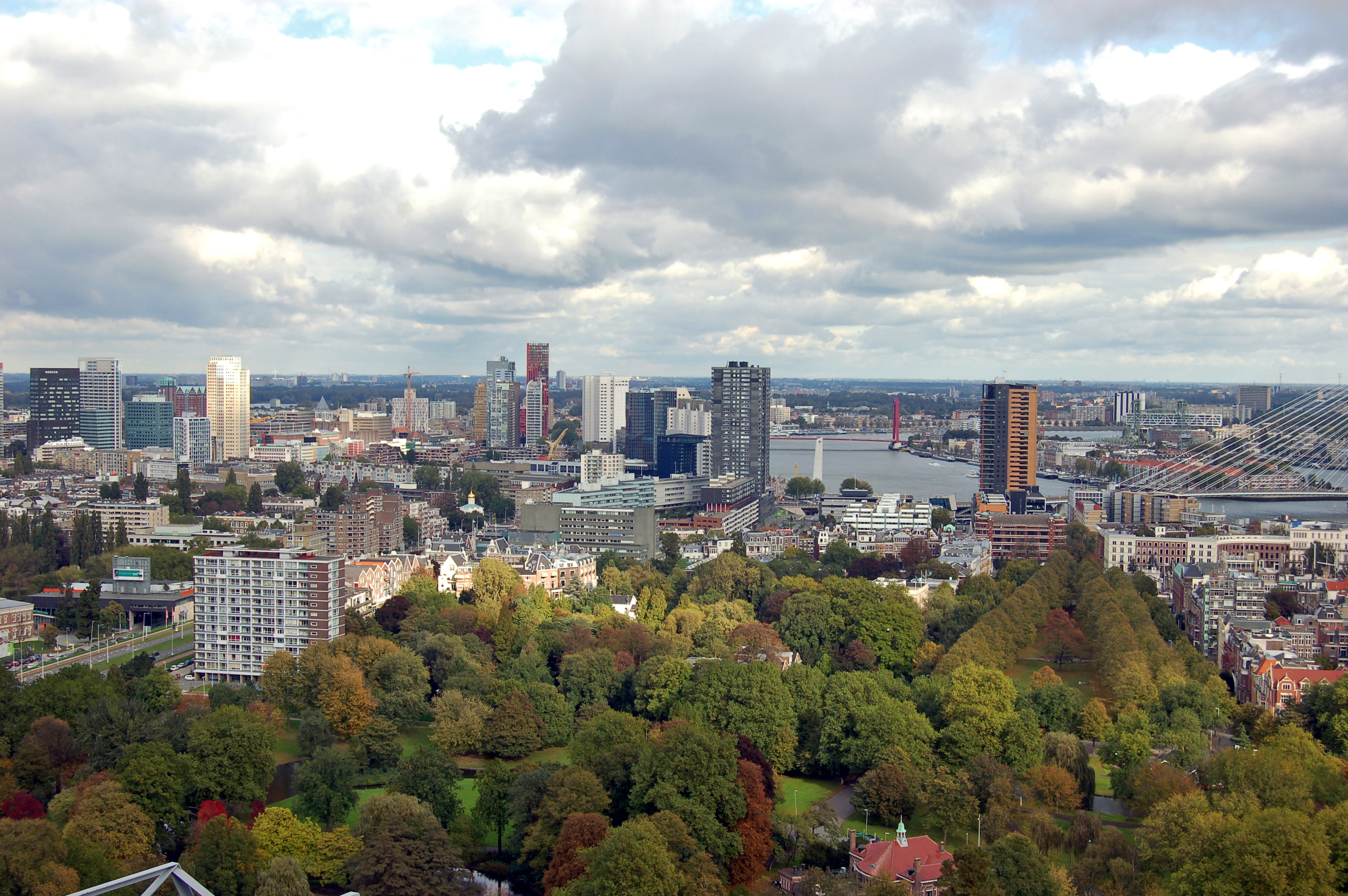 Rotterdam